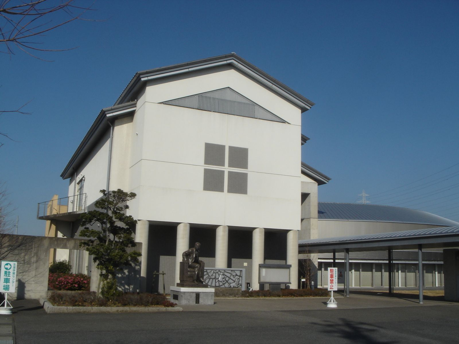 海津市生涯学習センター、岐阜県海津市